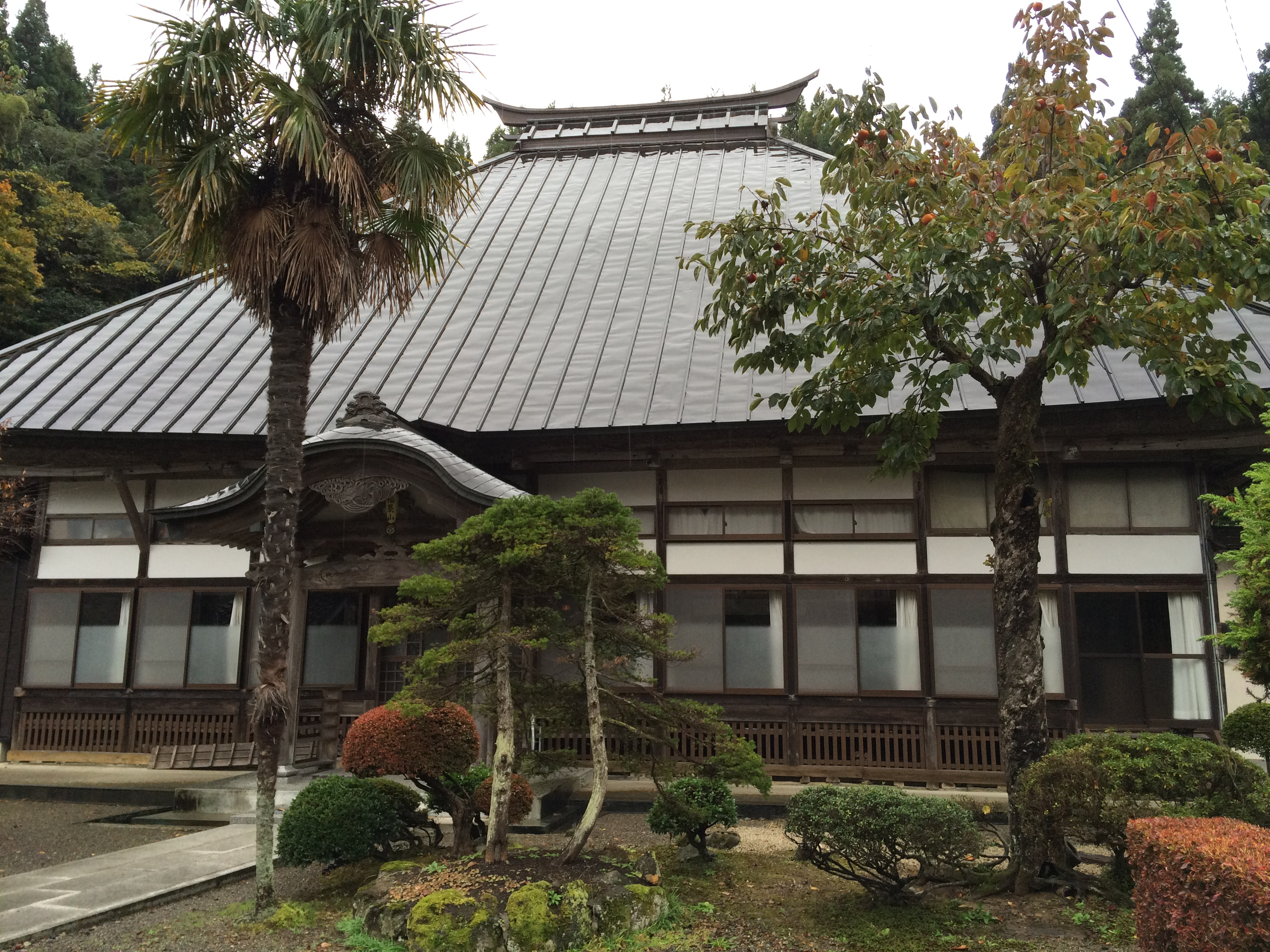 出雲崎町慈眼寺